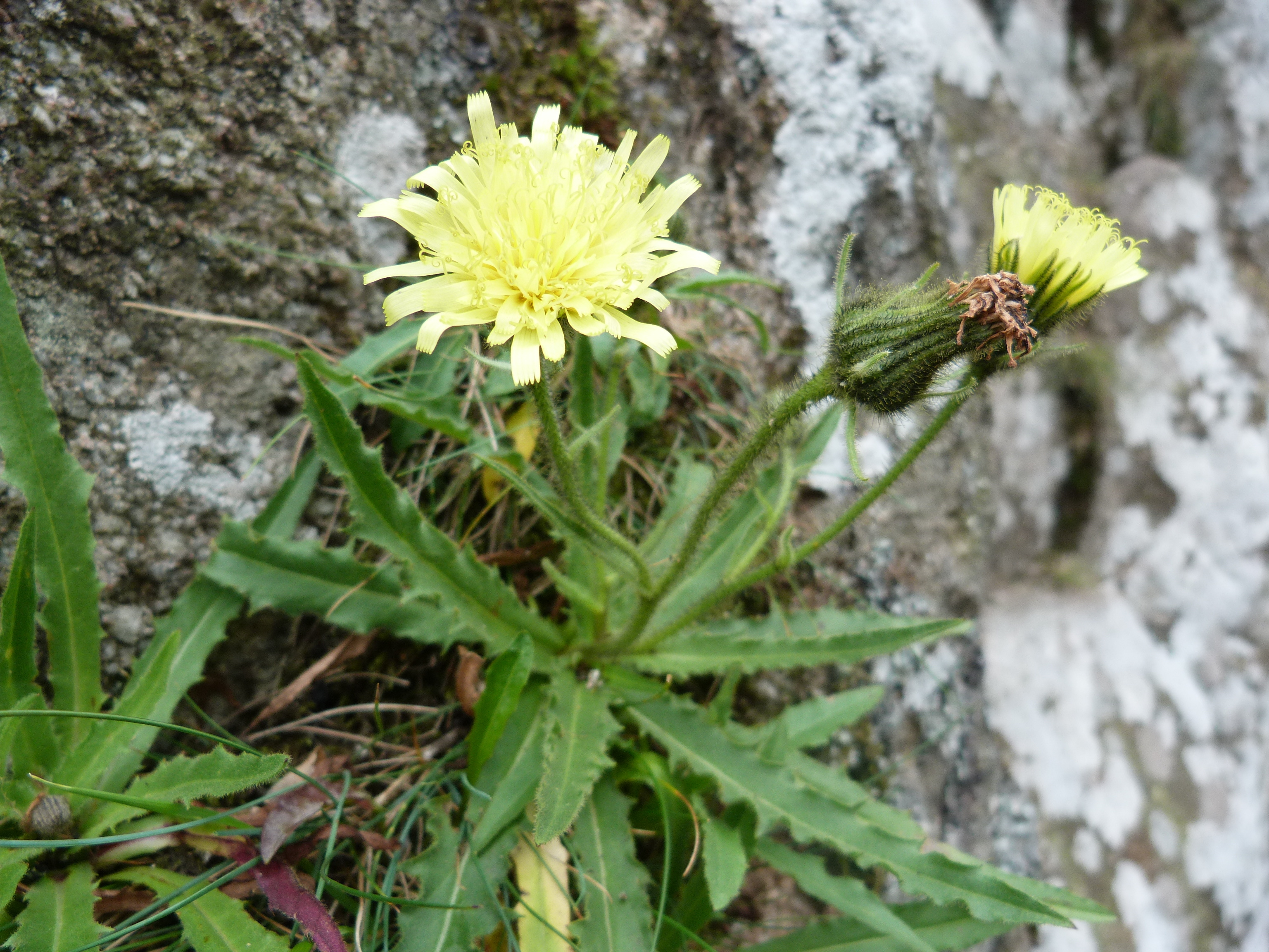 Épervière à feuilles de chicorée (Hieracium intybaceum) dans les Spitzkoepfe (massif des Vosges).